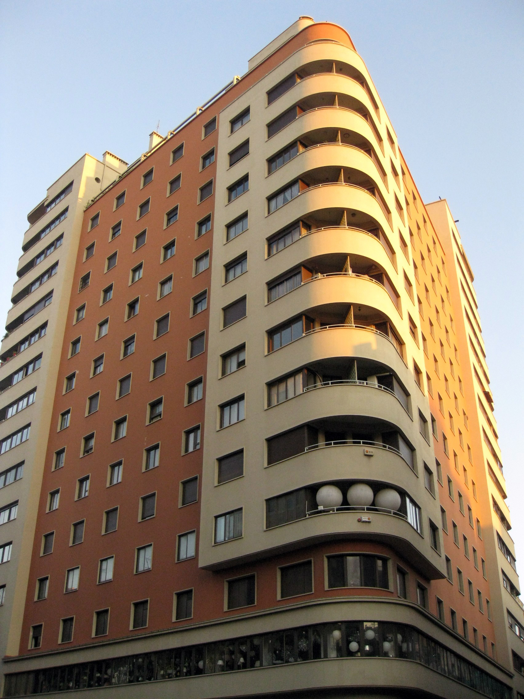 Edifici Fàbregas, conegut com el Gratacel Urquinaona per la seva posició a la plaça d'Urquinaona, a la cantonada entre els carrers Trafalgar i Jonqueres (Barcelona). Projectat per l'arquitecte Luis Gutiérrez Soto, fou construït entre 1936 i 1944; amb els seus 15 pisos d'alçada, fou el primer gratacel bastit a Barcelona.